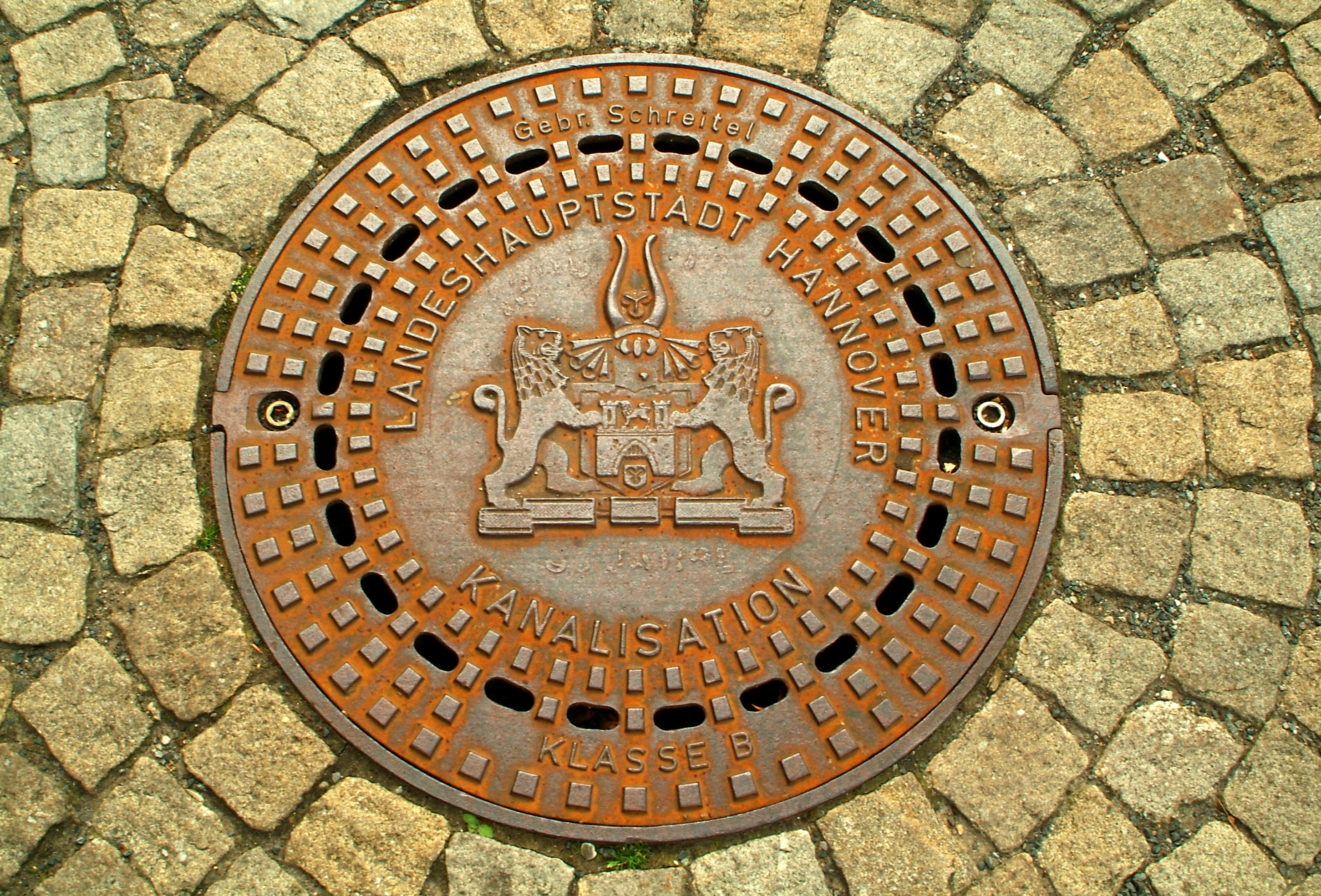 Einer von mehreren Kanaldeckeln der Gebr. Schreitel mit dem Wappen der "Landeshauptstadt Hannover / Kanalisation / Klasse B" in der Calenberger Straße vor dem Regierungsgebäude.